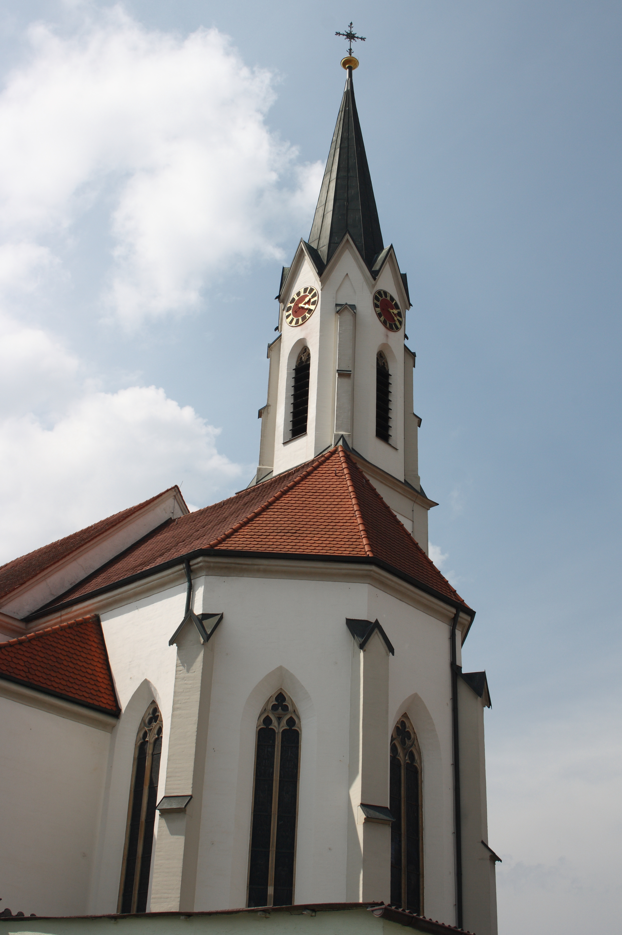 Katholische Pfarrkirche St. Peter und Paul in Hausen, einem Stadtteil von Dillingen im Landkreis Dillingen an der Donau (Bayern), Chor, Ansicht von Süden